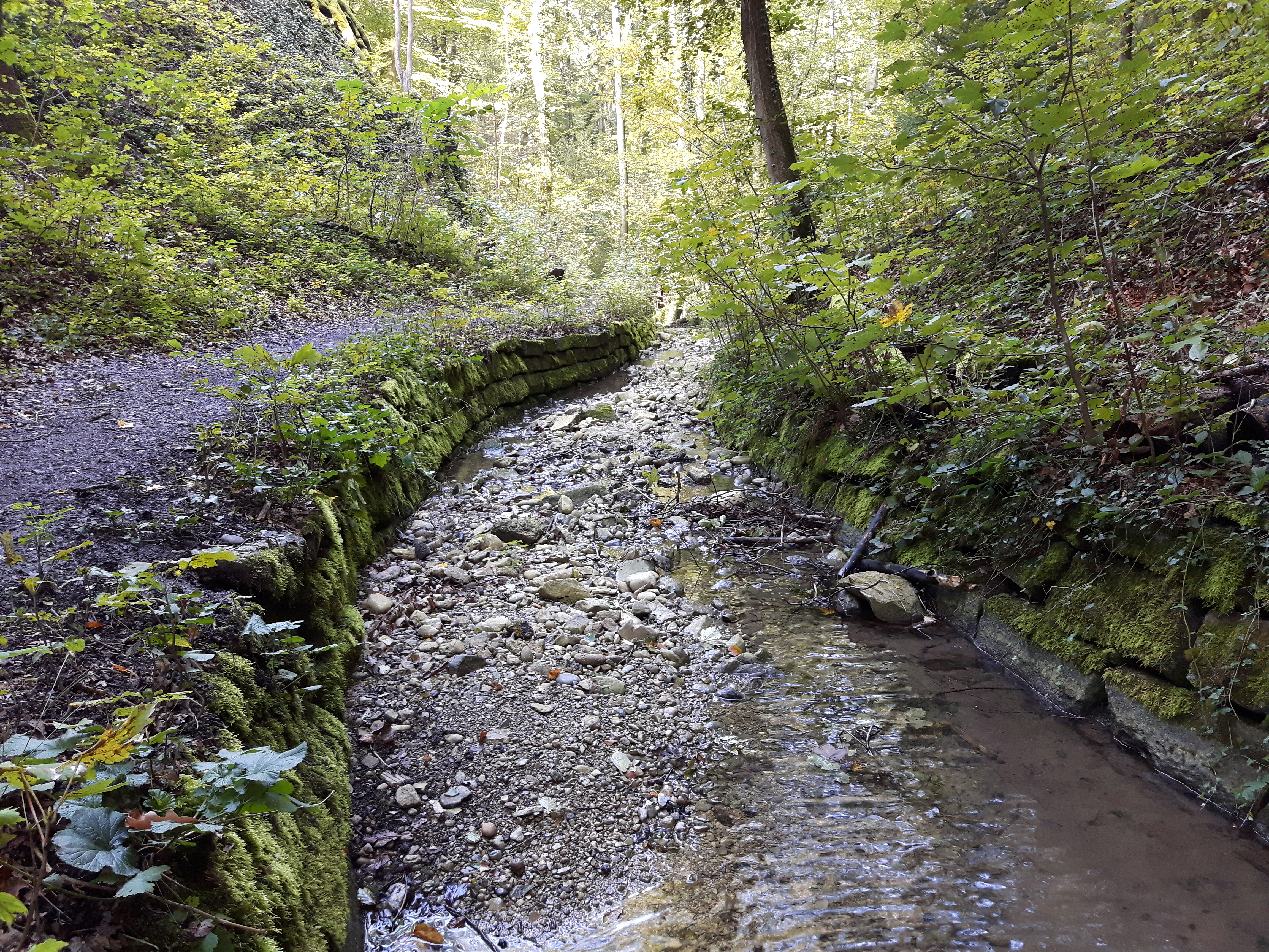 Fürtlibach vor der Einmündung des Weidtobelbachs in Züric